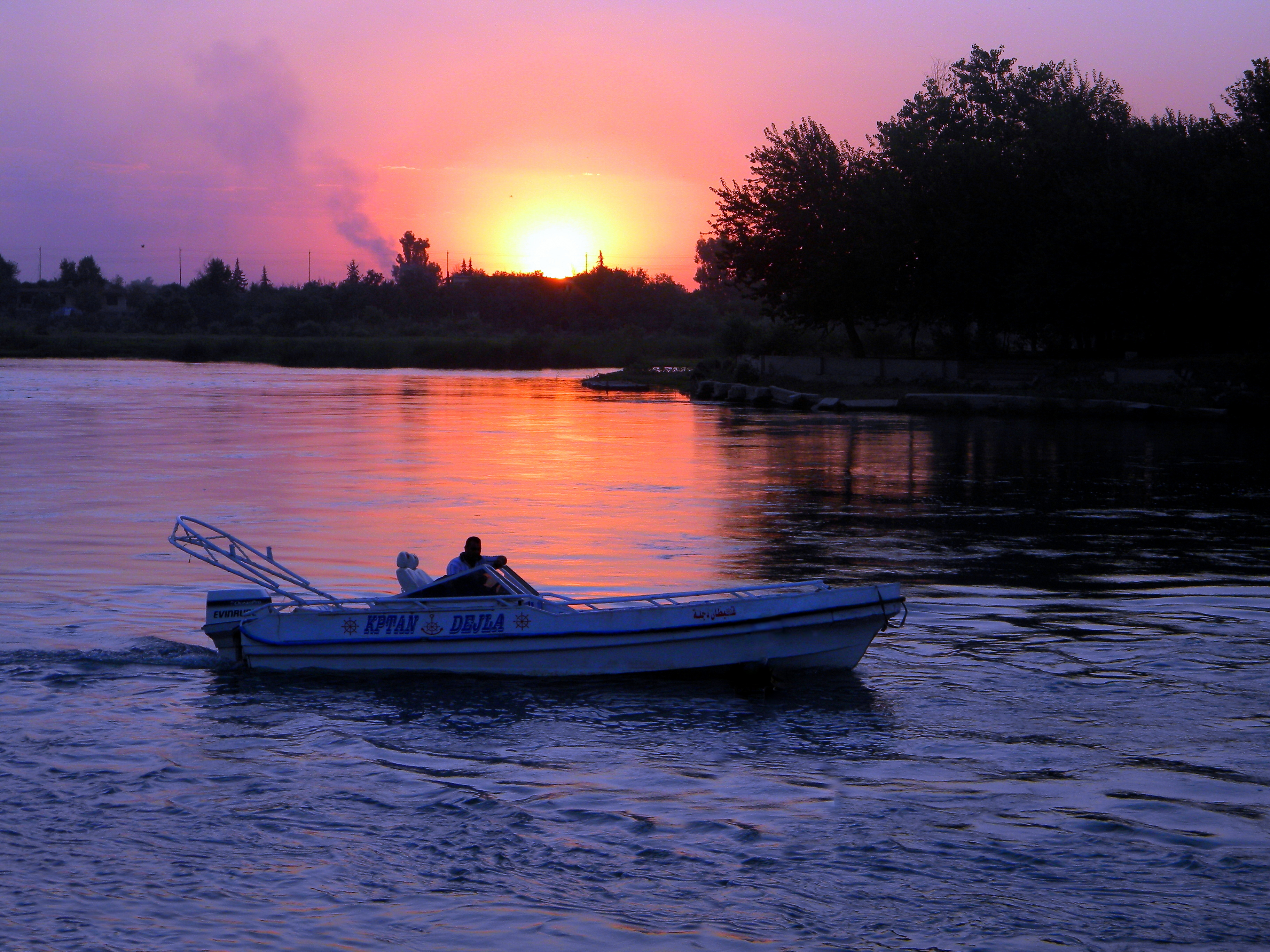 قارب في منطقة الغابات و المطلة على نهر دجلة